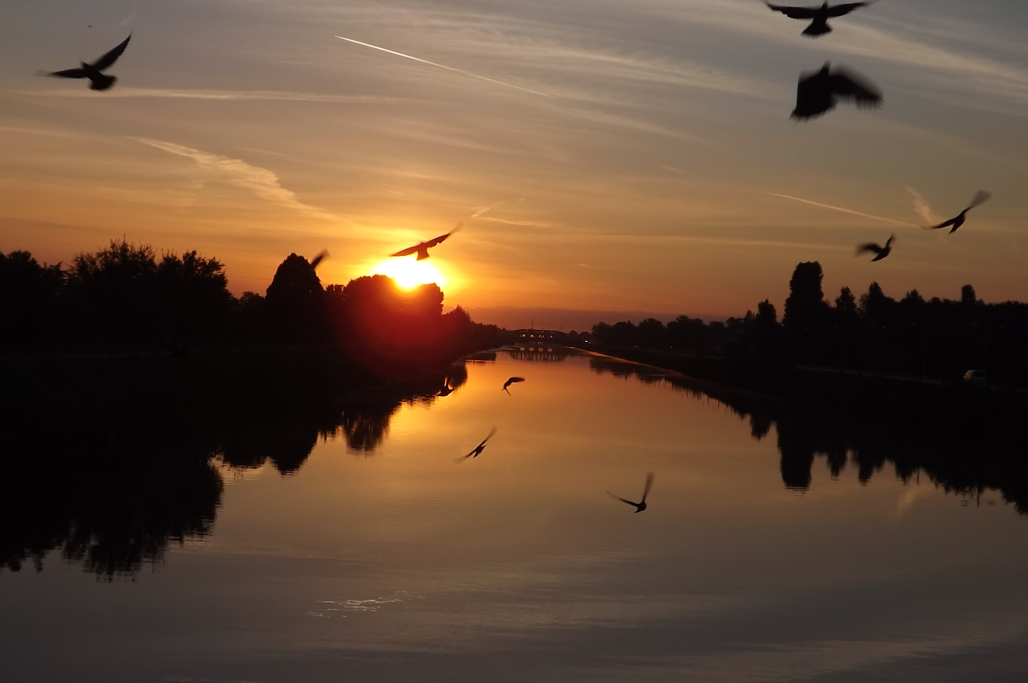 spettacolare alba a Padova